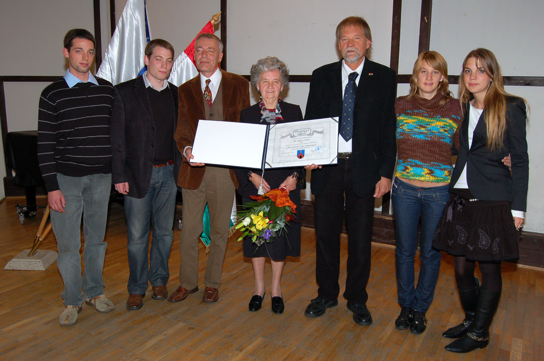 Dr. Réthy Zoltán díszpolgári oklevelét tartja annak leánya az átadás után